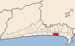 Bairro da Aviação, em Praia Grande.